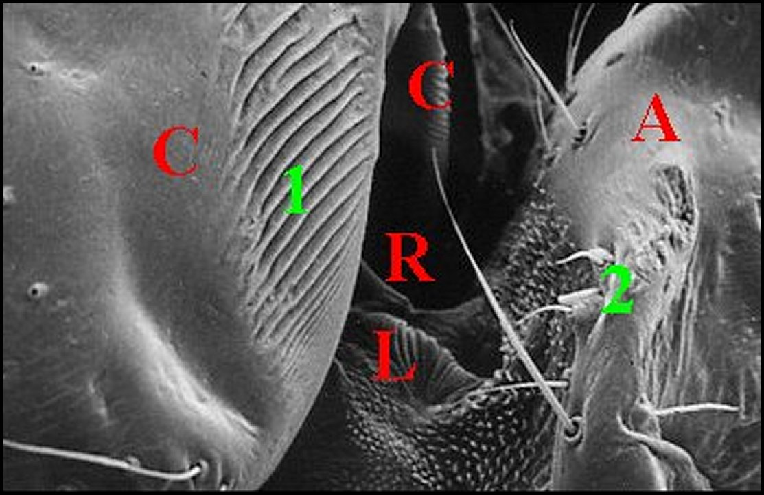 Pédicule, prosome et abdomen d' Argyrodes dracus en vue latérale gauche au microscope électronique à balayage.